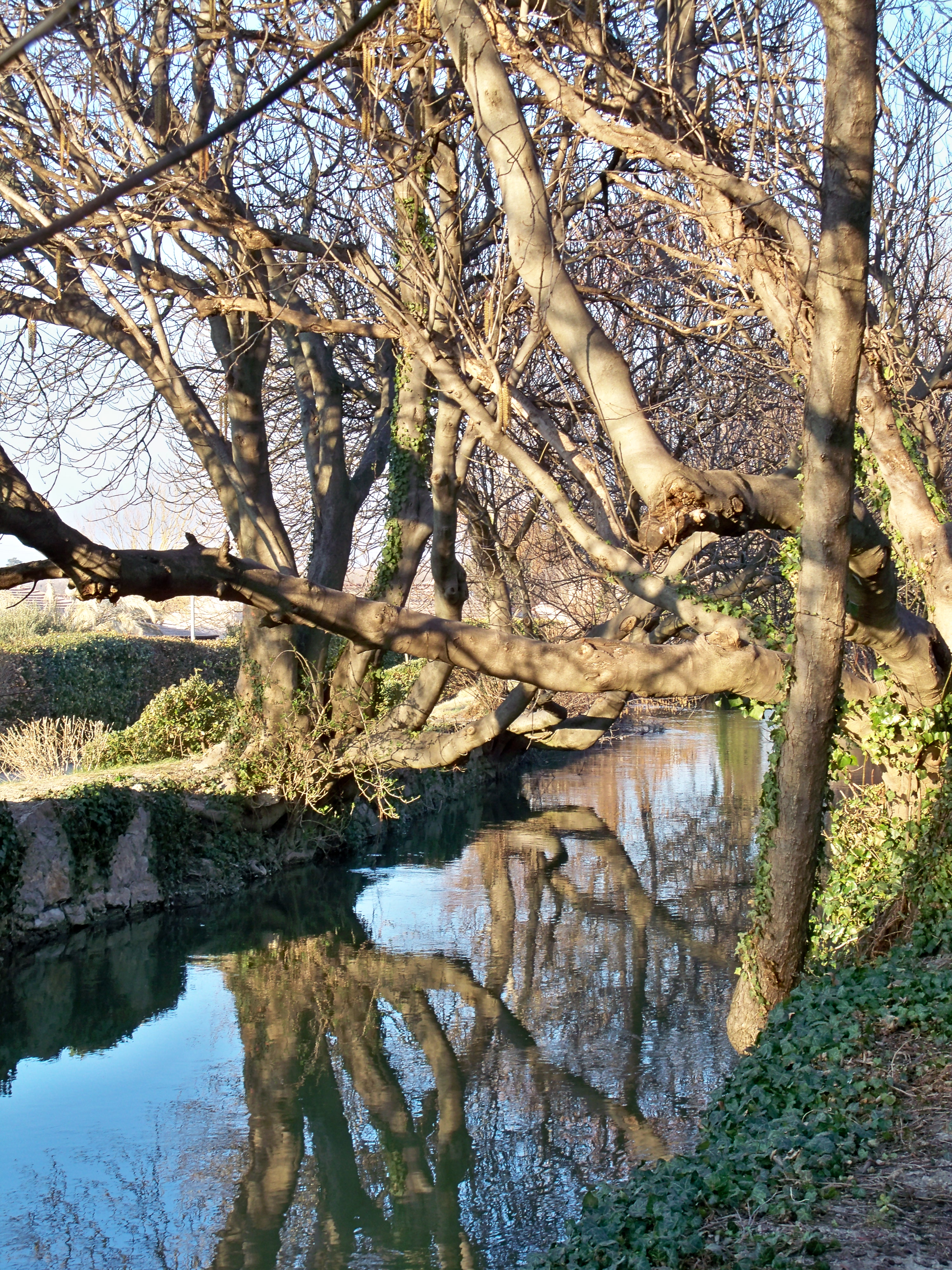 Canal de Vaucluse au Parc Chico Mendes, quartier du Pont des 2 Eaux à Avignon (84)